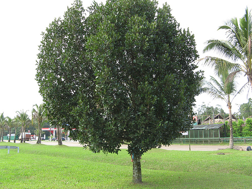 guanandi na riviera